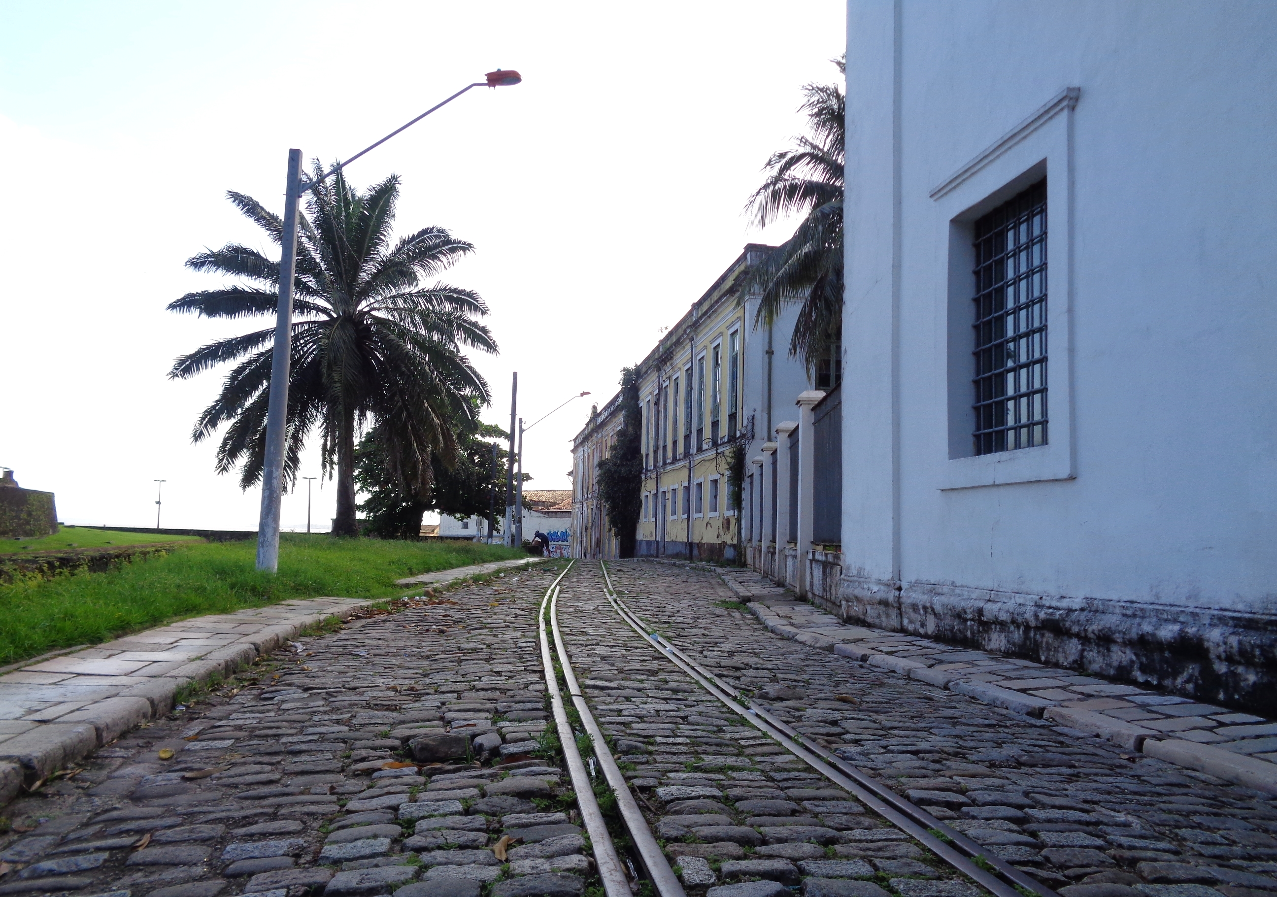 Ladeira do Castelo - Antigamente conhecida como Rua do Norte